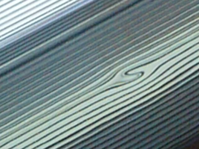 Delle im Licht einer Reflexionslampe